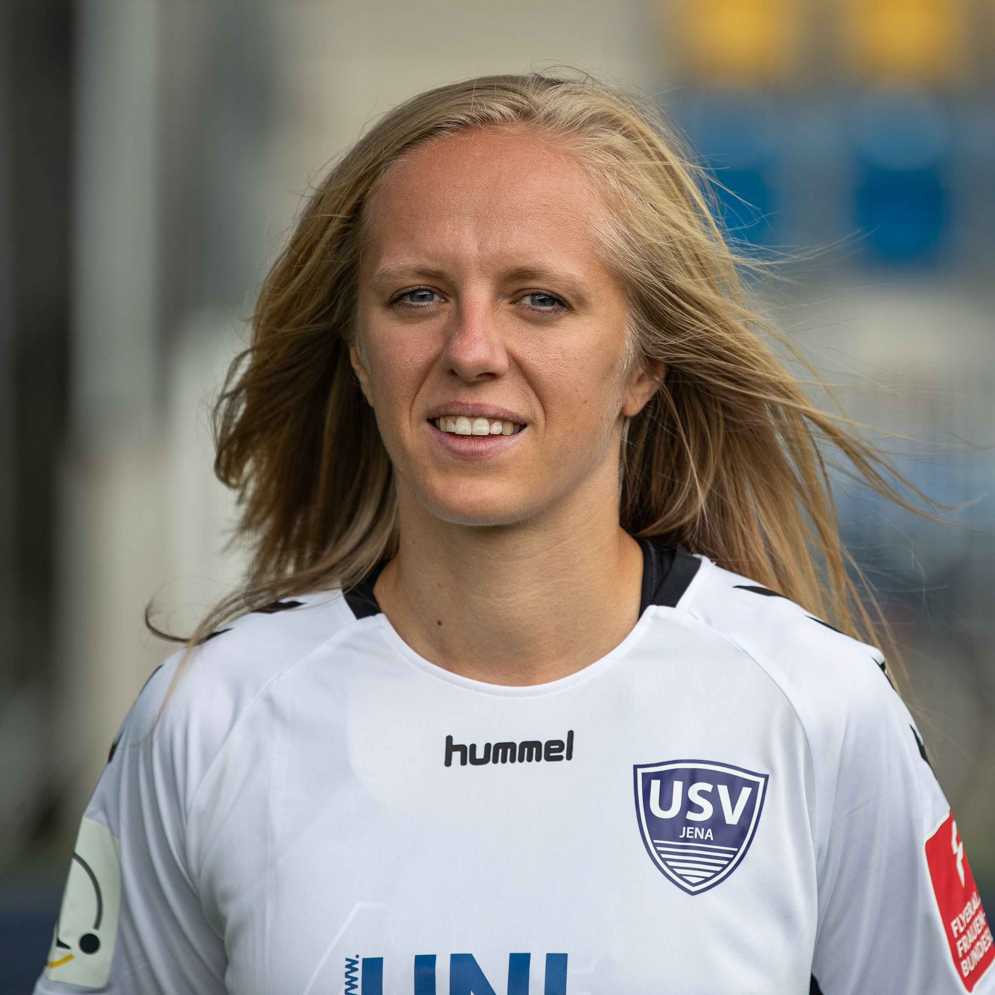 Fußball, Flyeralarm Frauen-Bundesliga, Mannschaftsfotos FF USV Jena; Jitka Chlastakova (FF USV Jena, 20); Porträt, Einzelbild